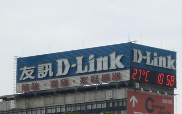 中文（台灣）: 臺北市大同區鄭州路，友訊科技廣告霓虹燈。